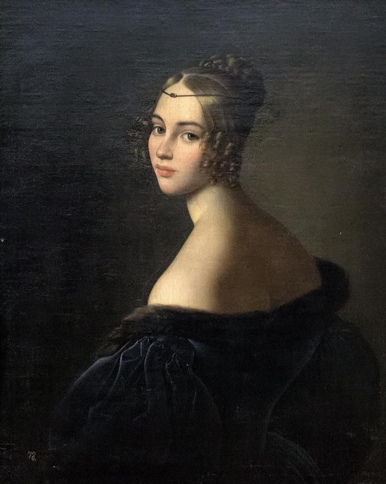 Княжна Мария Ивановна Барятинская, в замужестве княгиня Кочубей (1818-1843).